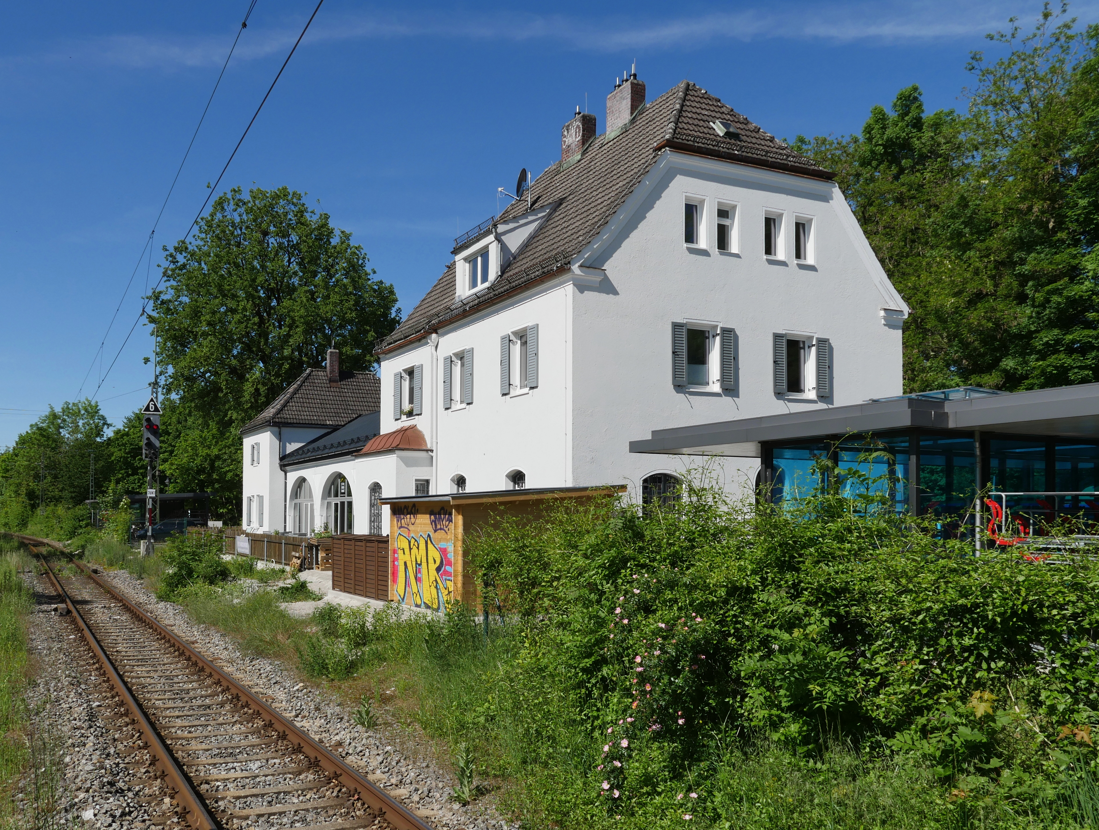 Empfangsgebäude des Bahnhofs Seefeld-Hechendorf an der Bahnstrecke Pasing–Herrsching von der Gleisseite